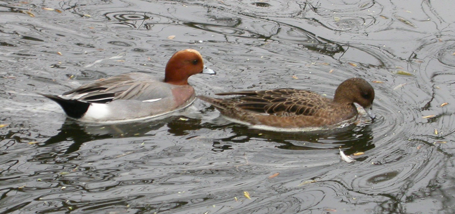 Anas penelope, Beijing Zoo